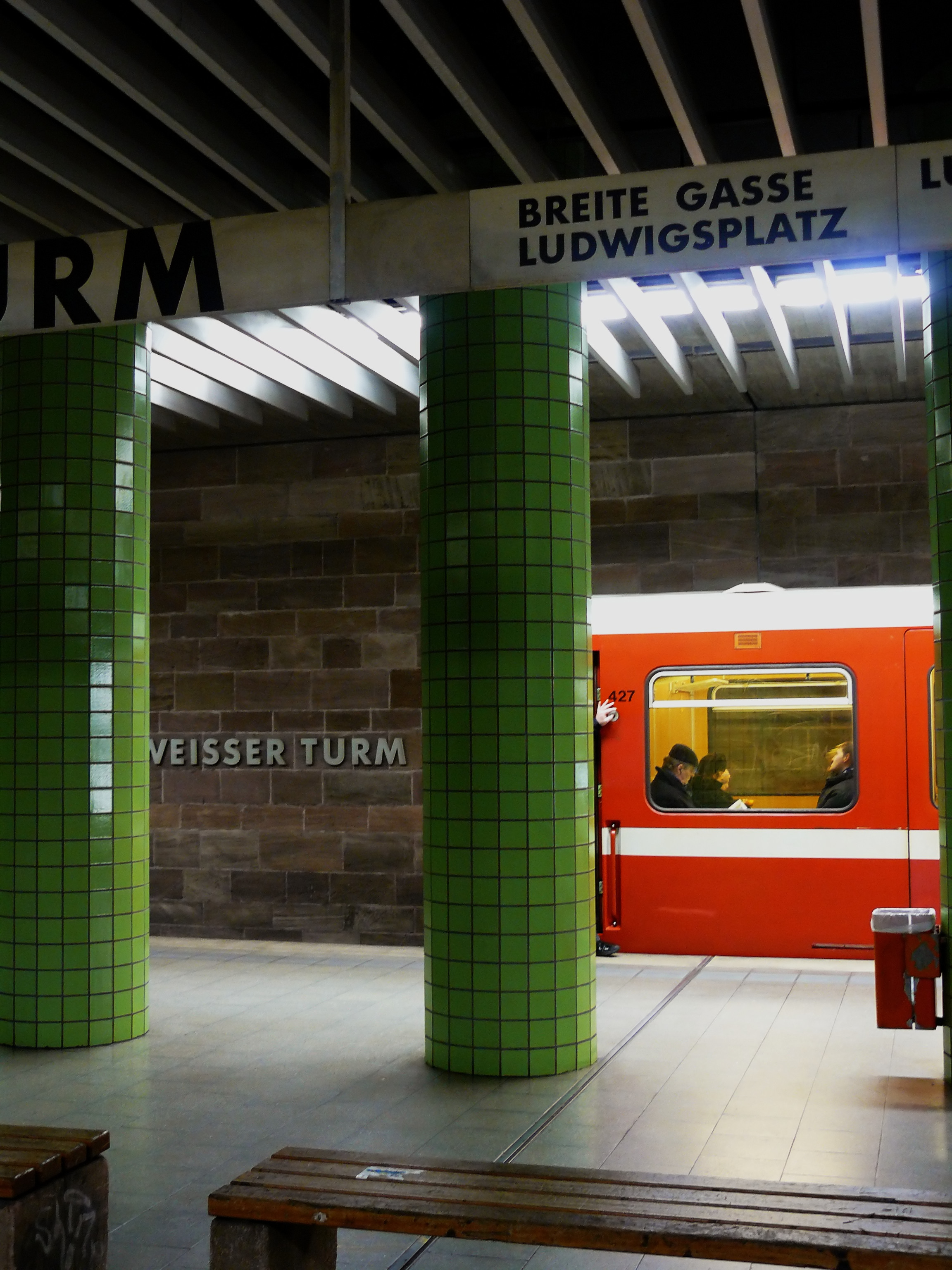 U-Bahnhof Weißer Turm